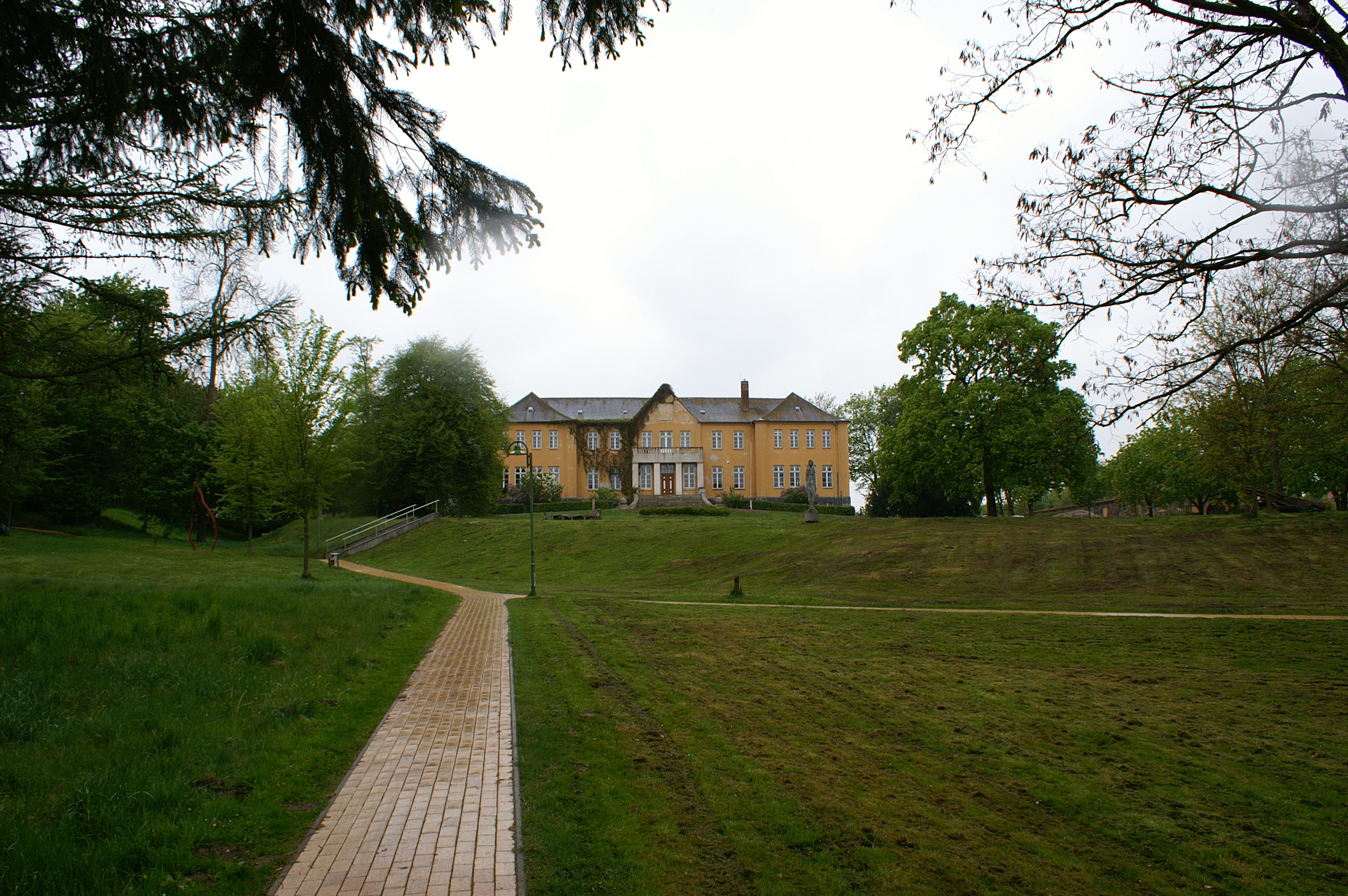 Ehemaliges Herrenhaus Schloss Wieck bei Gützkow (Landkreis Ostvorpommern), Schlosspark